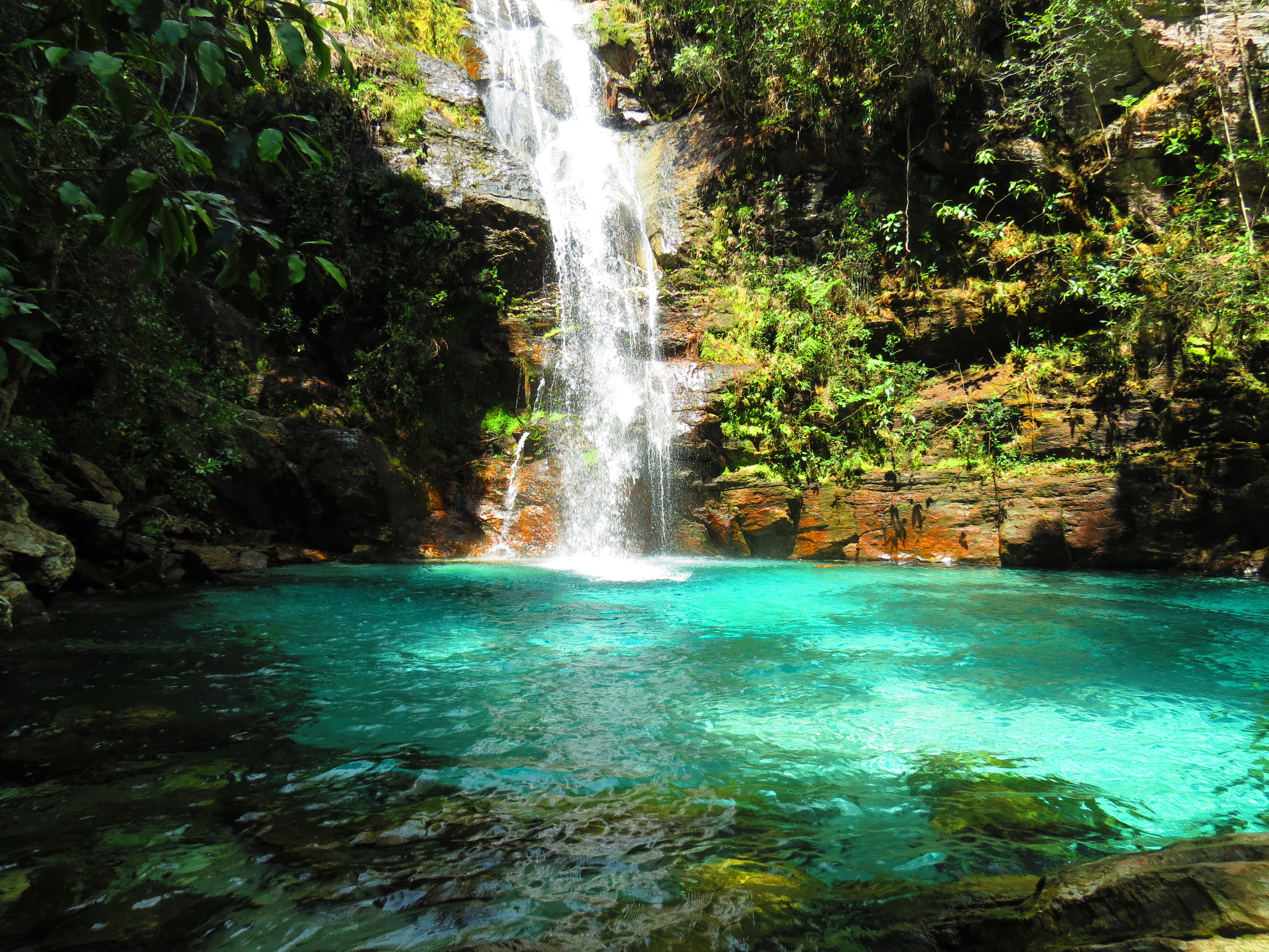 A cachoeira da Santa Bárbara está localizada no município de Cavalcante Goias na comunidade Kalunga